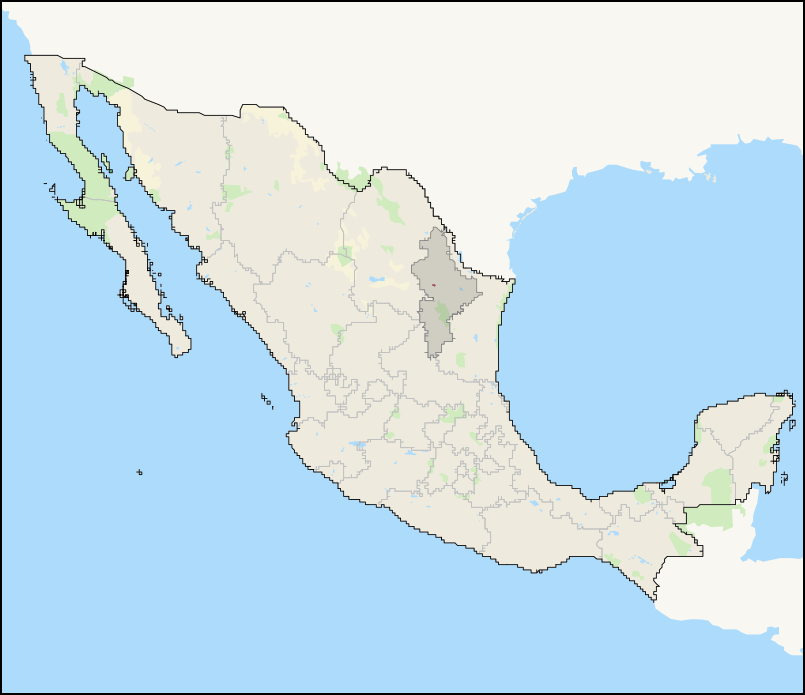 Mapa del distrito electoral federal 4 de Nuevo León ubicado en México